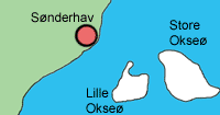 Karte der Ochseninseln; eigene Bearbeitung, public domain